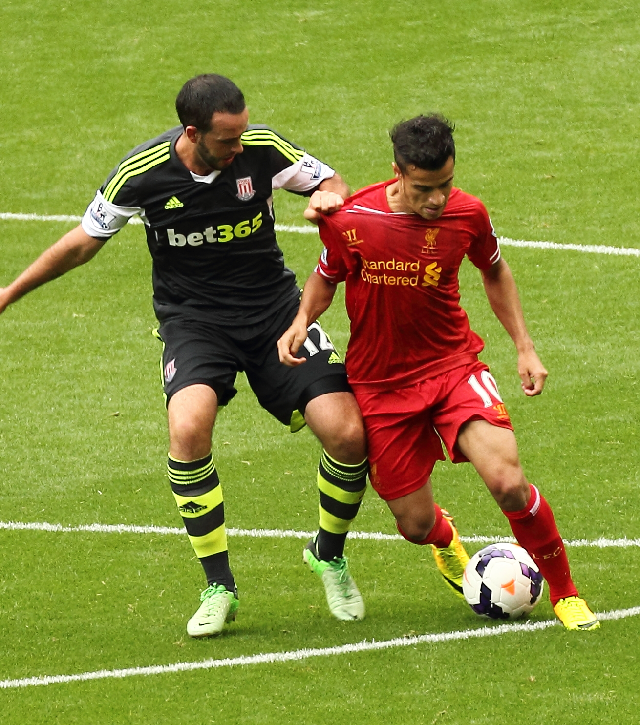 Coutinho escapes clutches